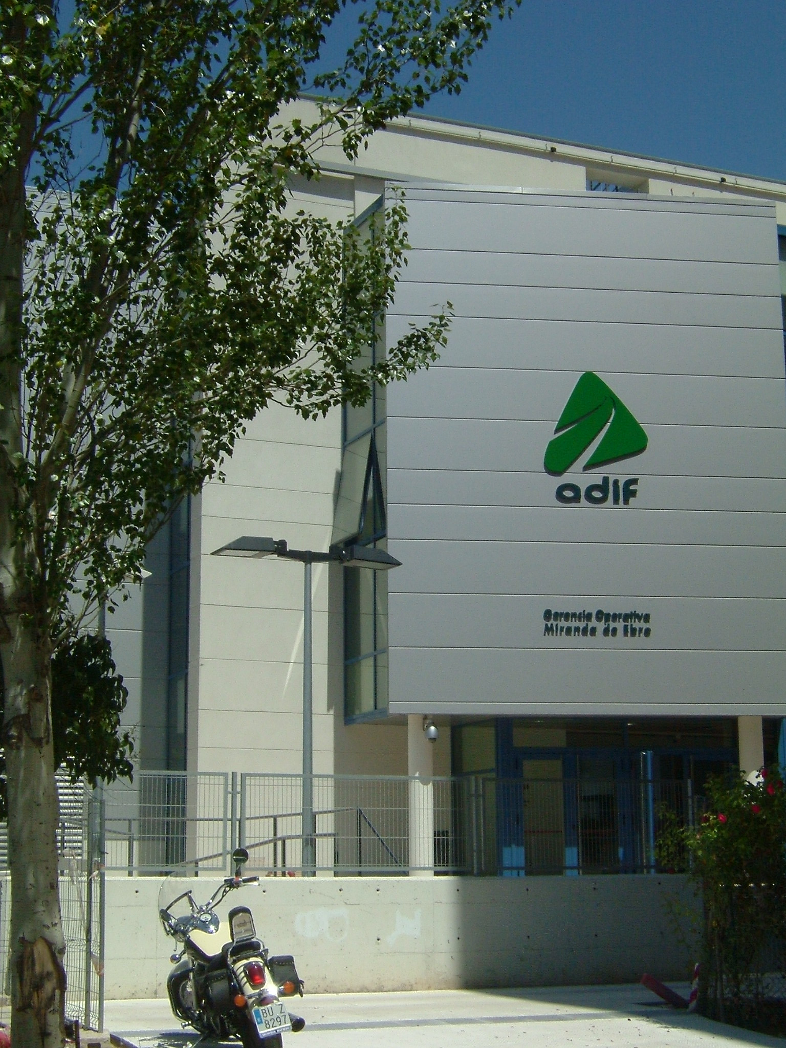 Centro de Control de Adif en Miranda de Ebro.